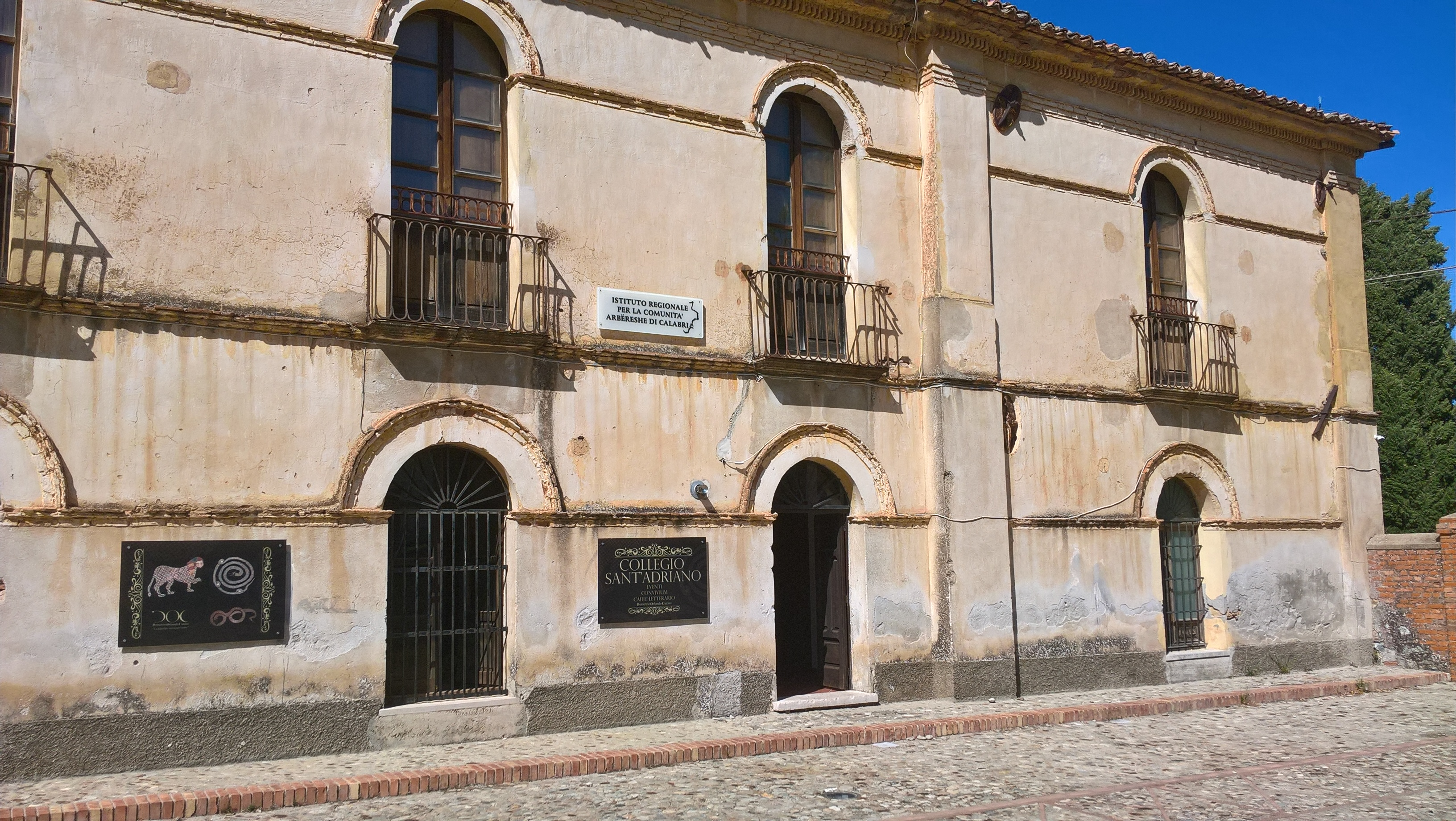 Ex College Sant'Adriano